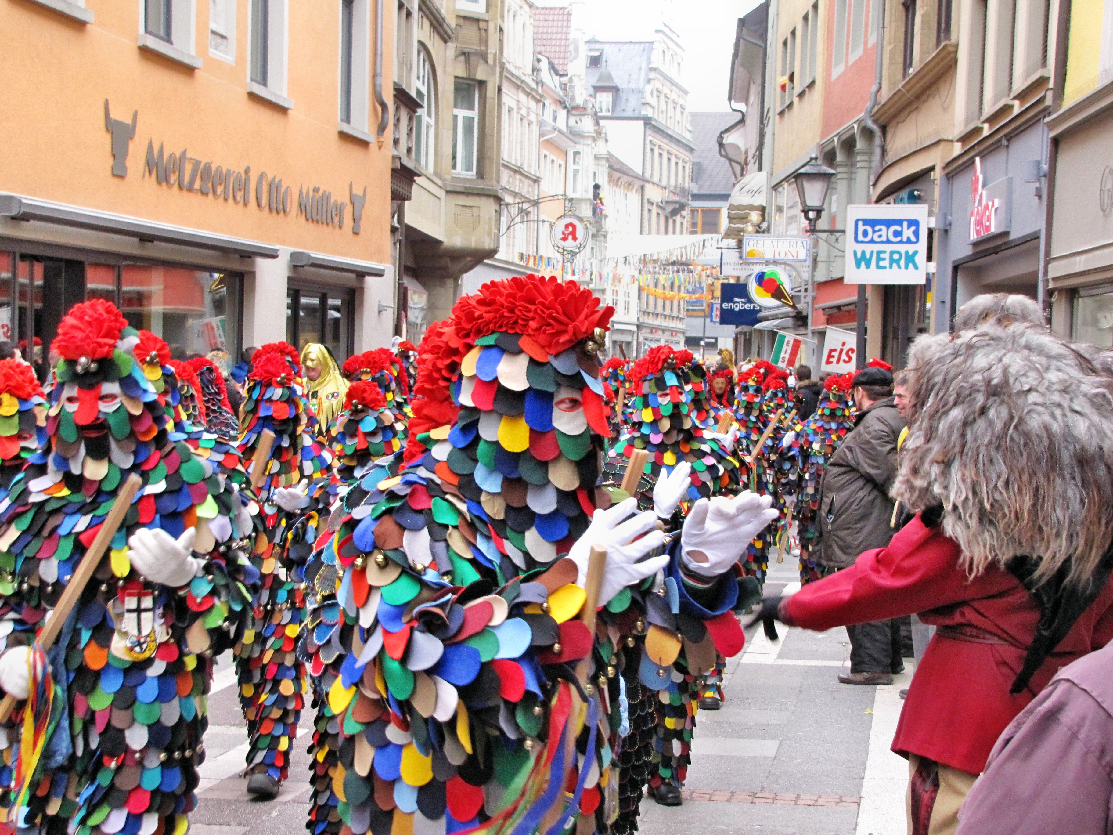 Blätz beim Schnurren während einem Umzug